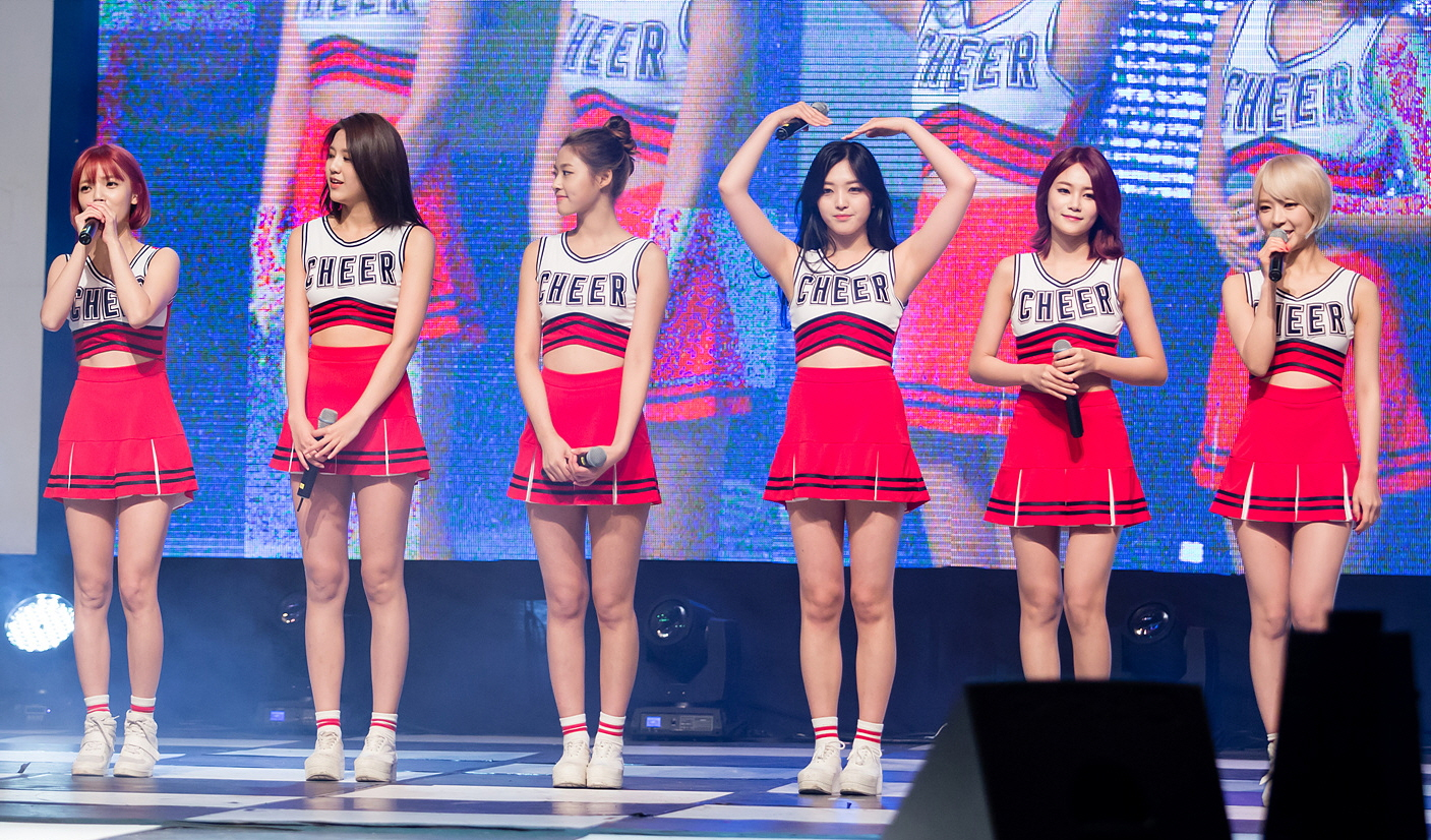 141017 경복대학교 축제 AOA